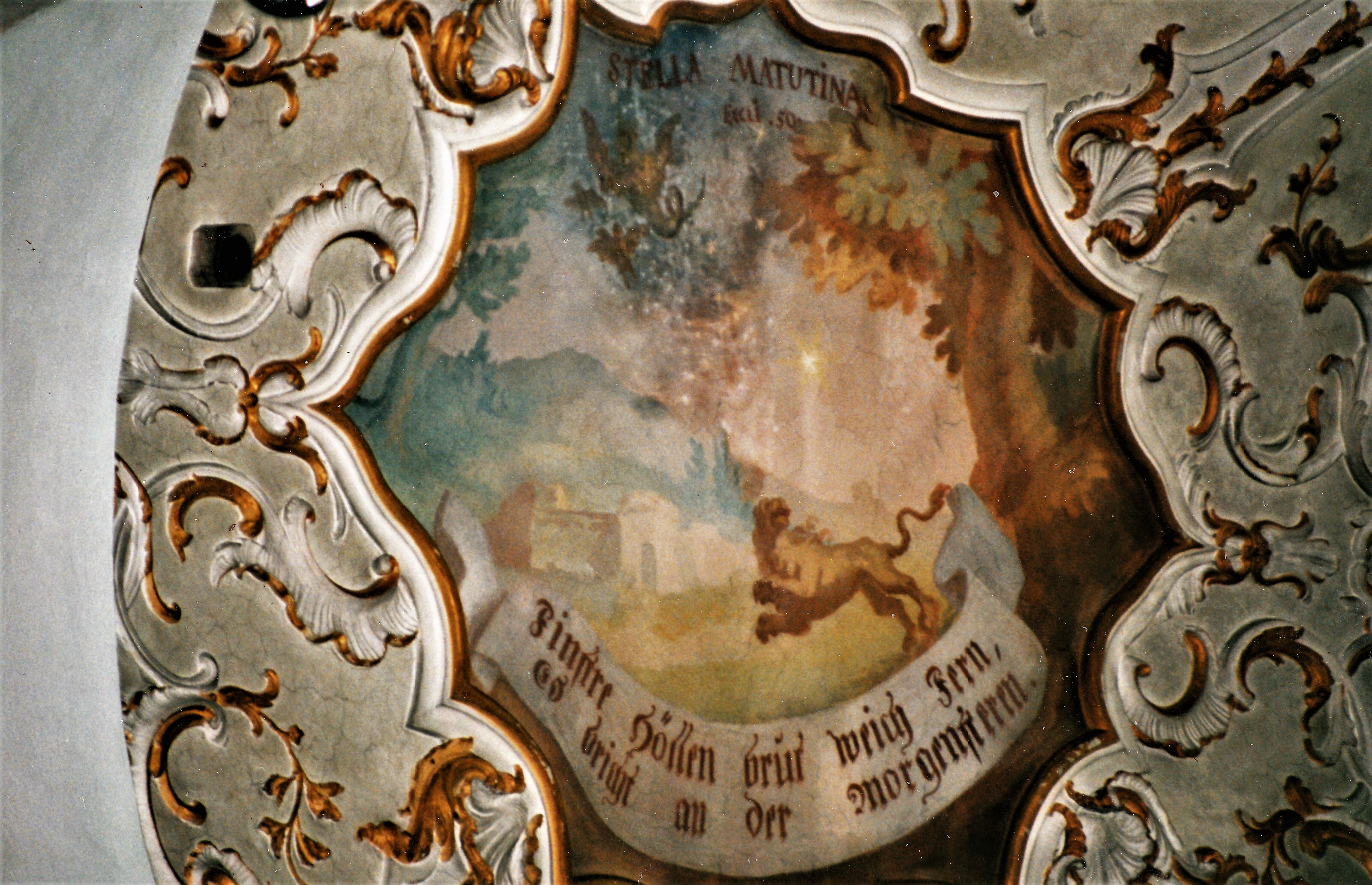 Maria Brünnlein - Fresko von Johann Baptist Zimmermann: Stella matutina (Morgenstern)